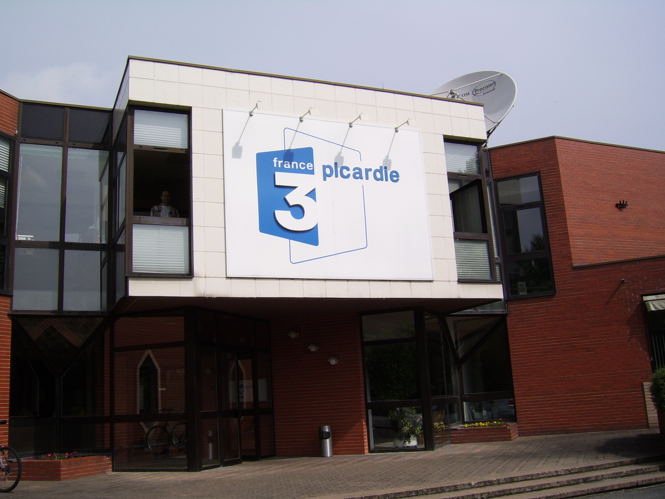 Siège de France 3 Picardie